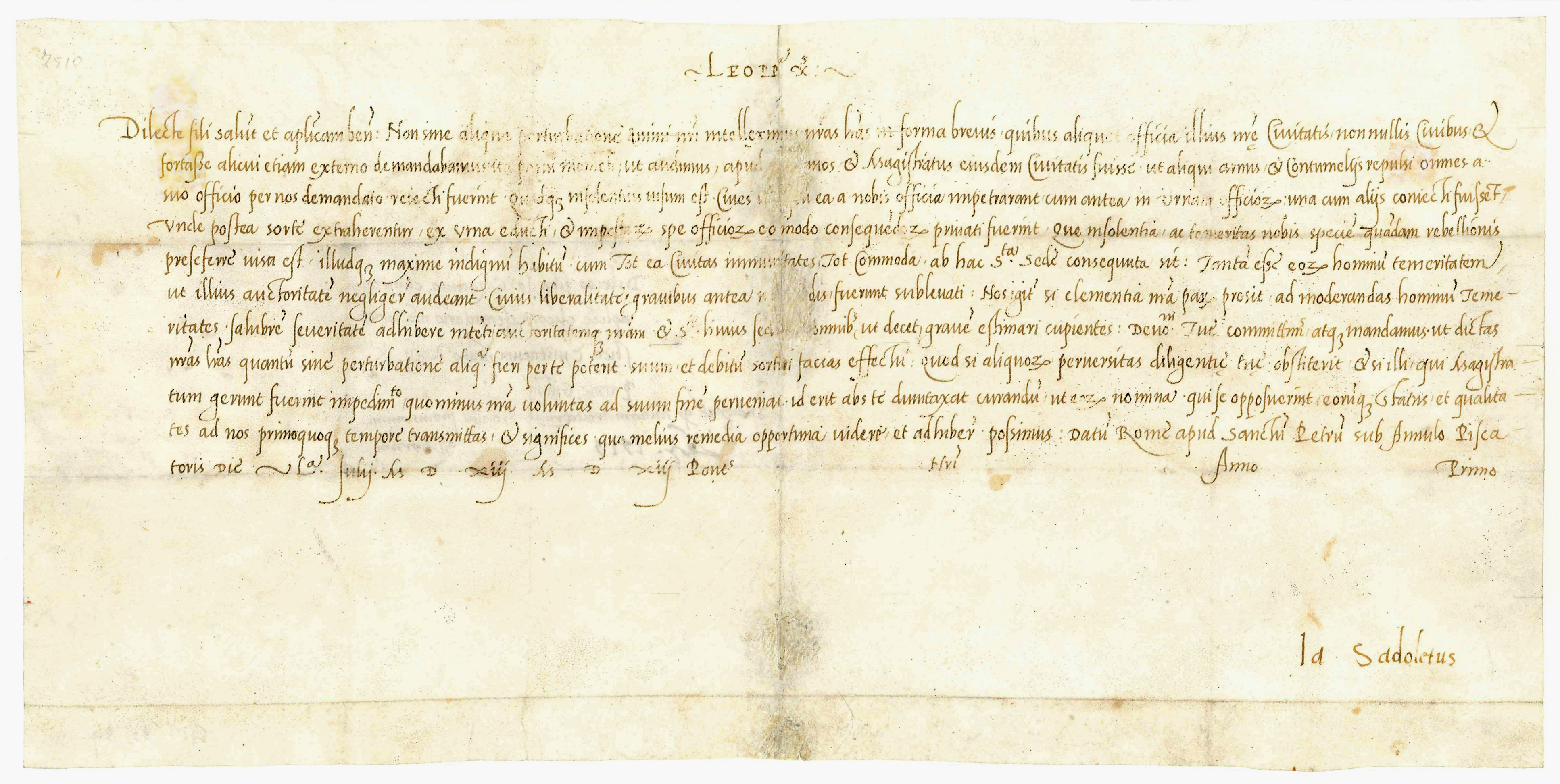 Breve_Papst_Leo_X._Gutenberg-Museum-Mainz. In Cancellaresca auf Pergament geschrieben von Ludovico Vicentino degli Arrighi.